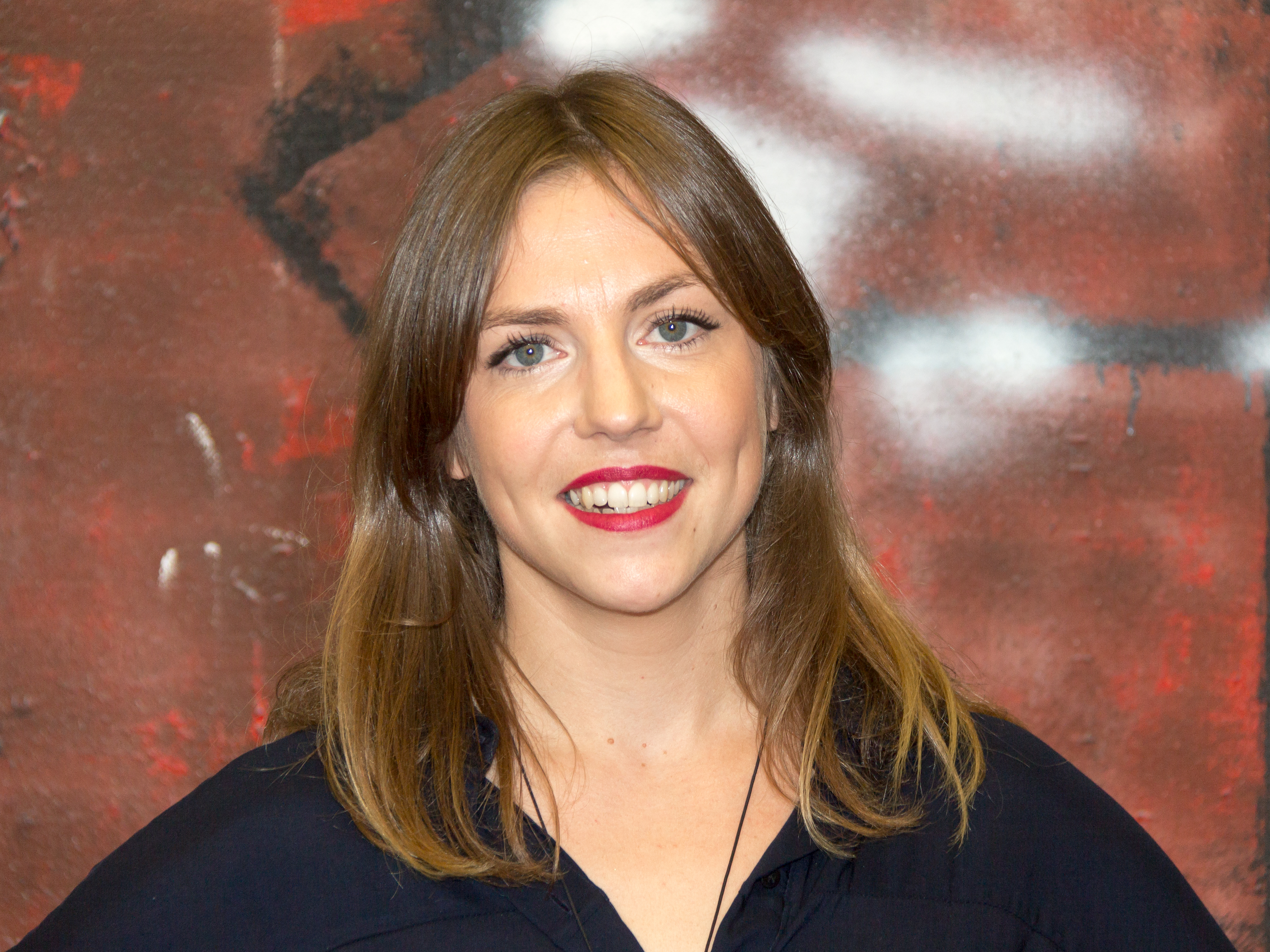 Pressetermin 30 Jahre Lindenstraße - Hana Geißendörfer